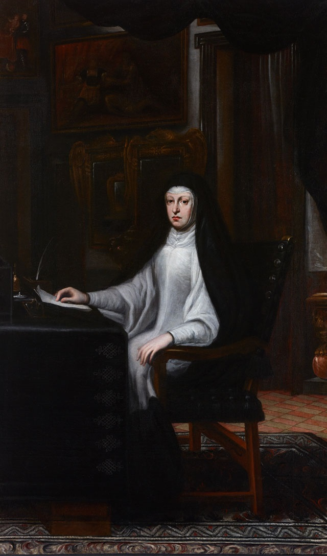 Retrato de la reina Mariana de Austria (1634-1696), que fue reina consorte de España por su matrimonio con Felipe IV y también la madre del rey Carlos II de España, durante cuya minoría de edad actuó como regente del reino. La reina aparece en actitud orante y arrodillada sobre un reclinatorio.